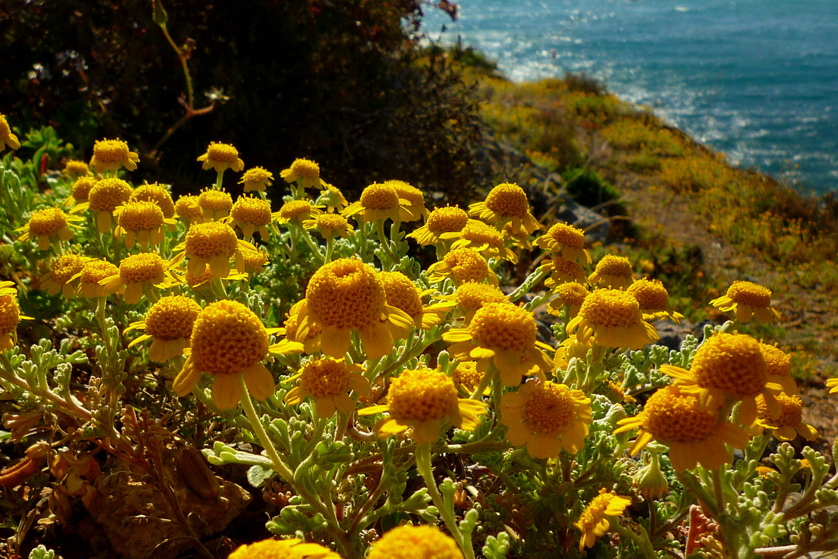 Anthemis chrysantha (Manzanilla de Escombreras), endemismo iberoafricano, en la punta de La Azohía, Cartagena, España.